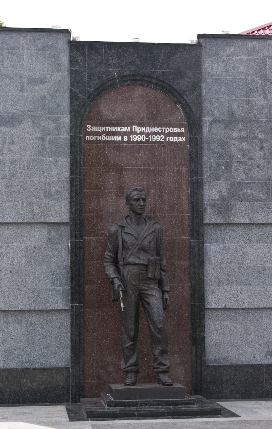 Памятник защитникам Приднестровья на Мемориале Славы в Тирасполе